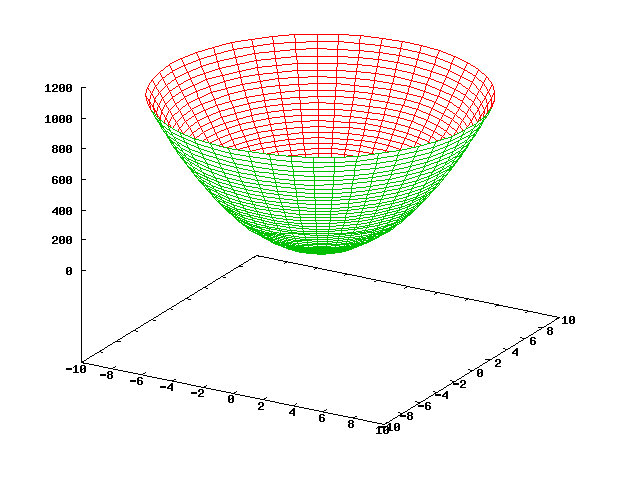 Oszillatorpotenzial in 2 Dimensionen